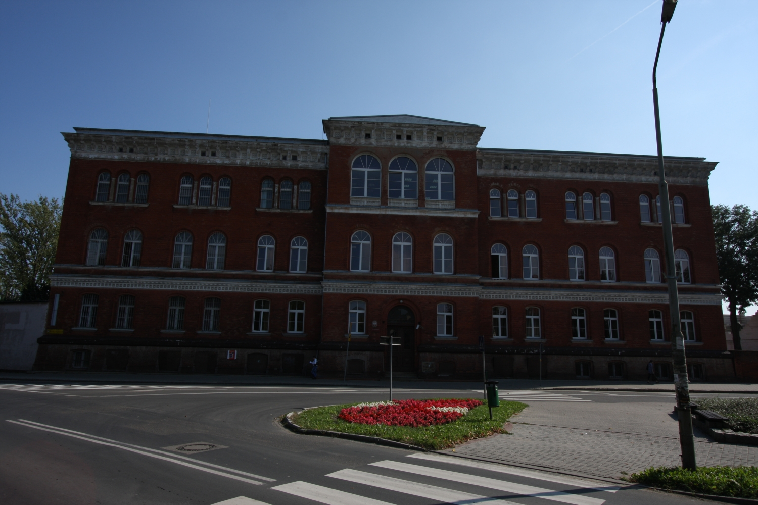 Międzyrzecz, ul. Wojska Polskiego 7 - dawny sąd, obecnie areszt śledczy, mur., 1890 (zabytek nr L-55 z 5.02.2002)